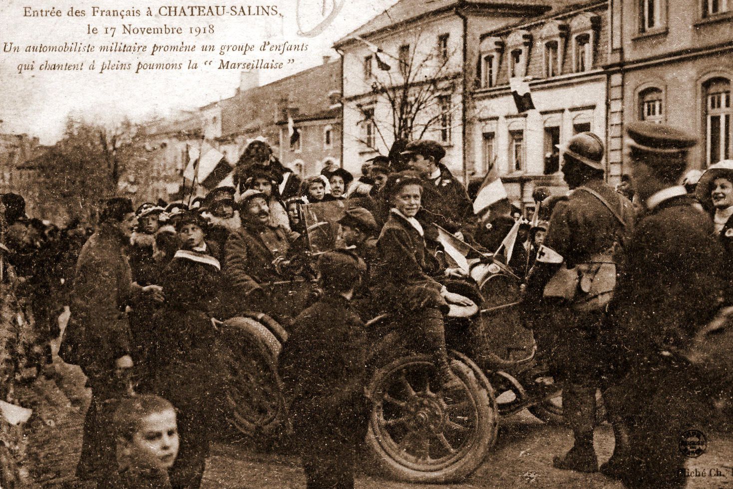 Libération de Château-Salins